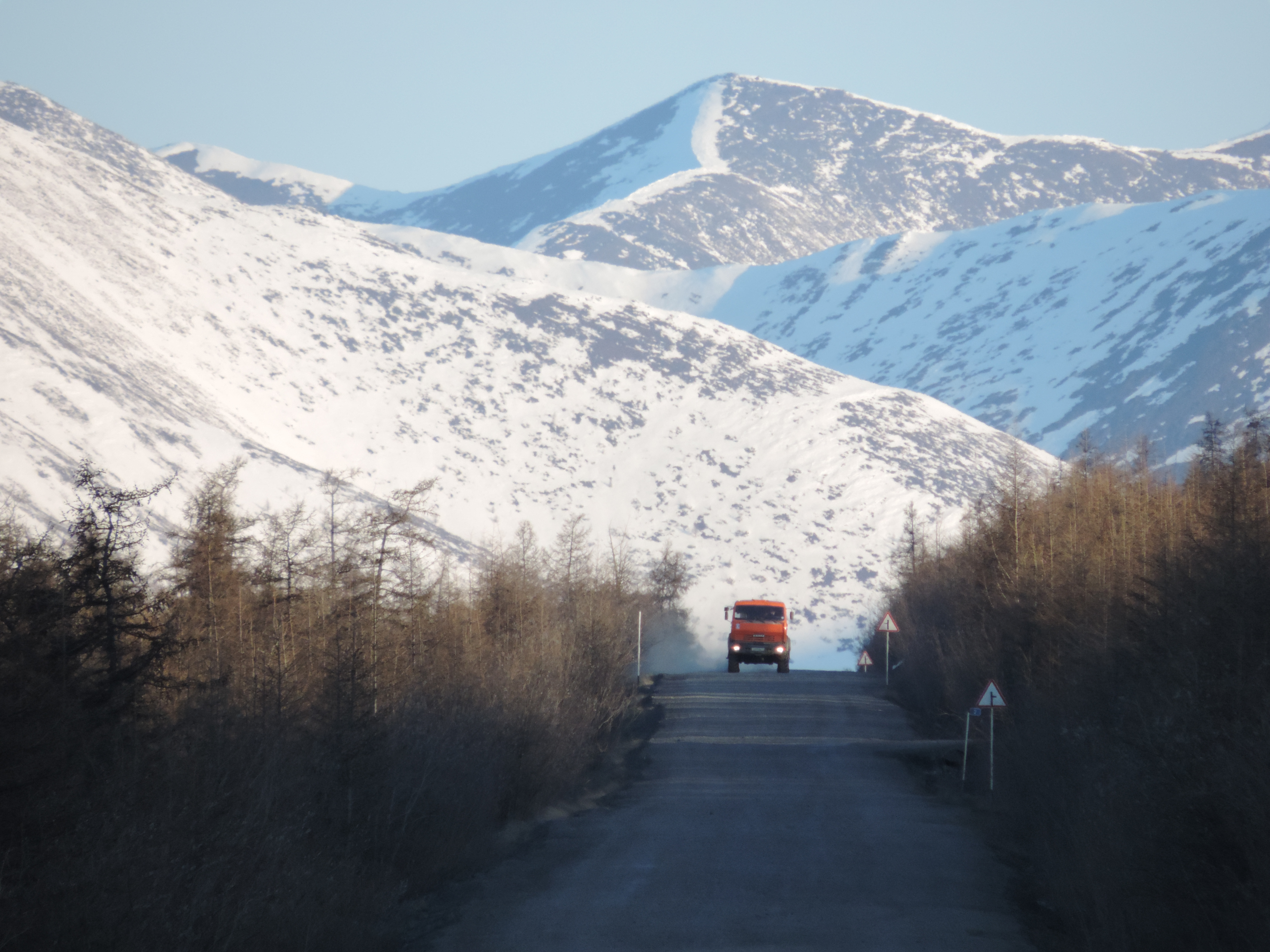 Bilibinsky District, Chukotka Autonomous Okrug, Russia